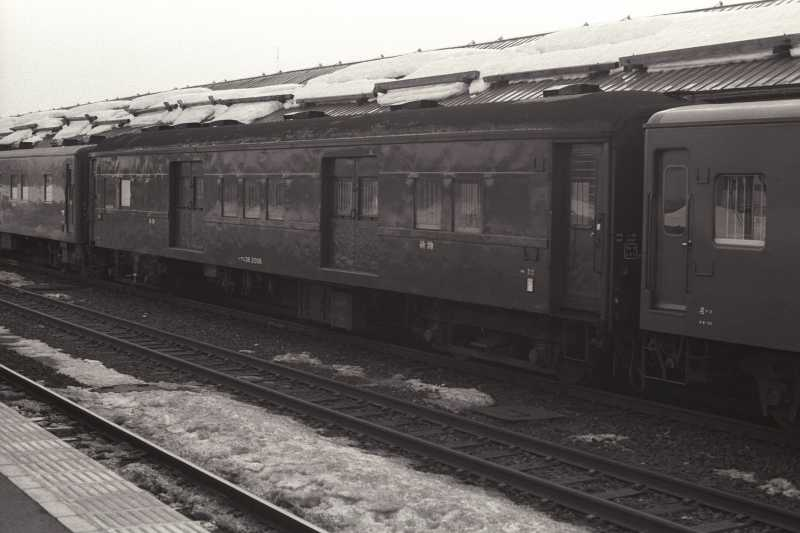 JNR Passenger car type mani 36 No. mani36 2008 (baggage car). 国鉄マニ36 2008 荷物車